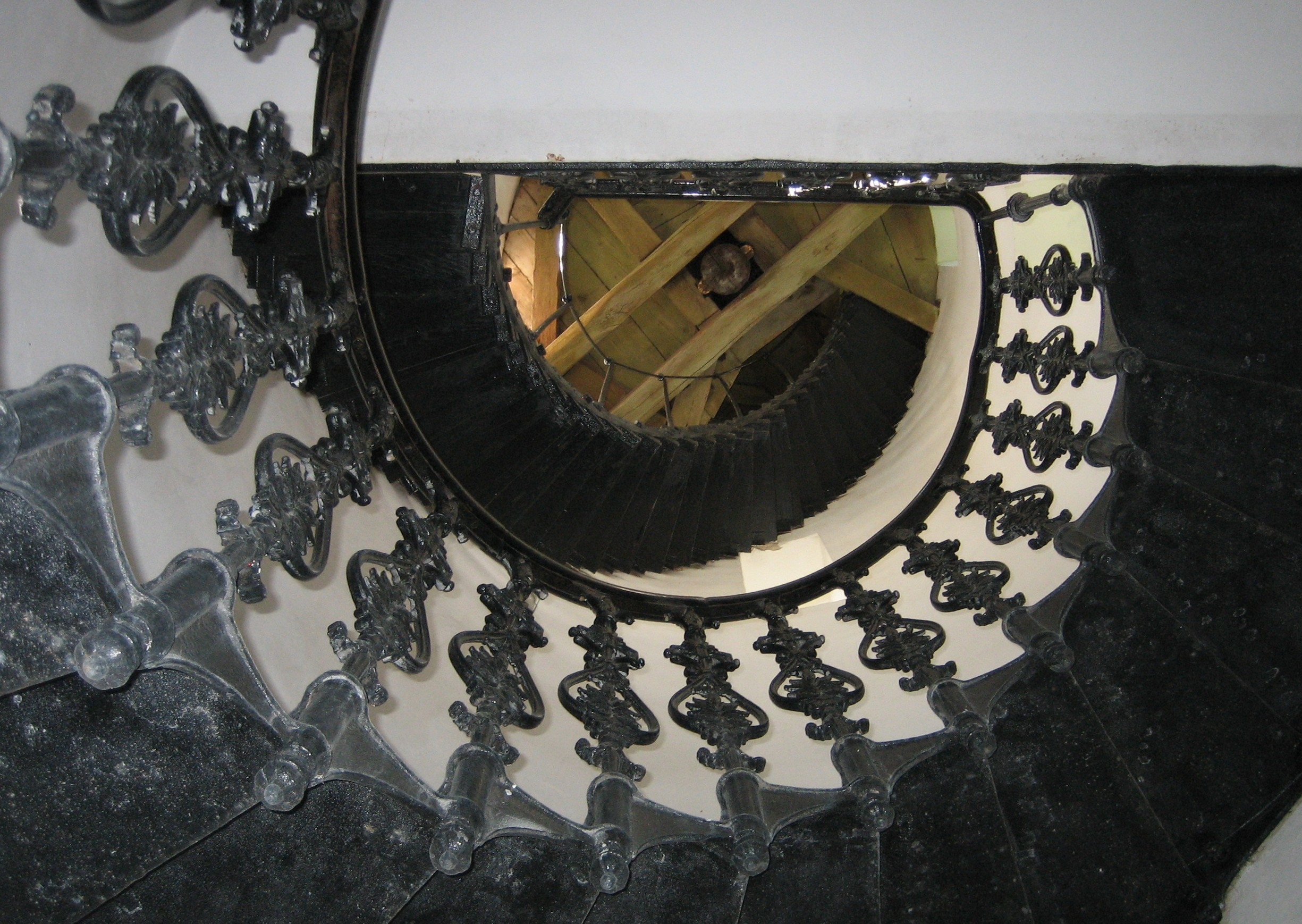 A füzérradványi Károlyi-kastély tornyának csigalépcsője This is a photo of a monument in Hungary. Identifier: 2768